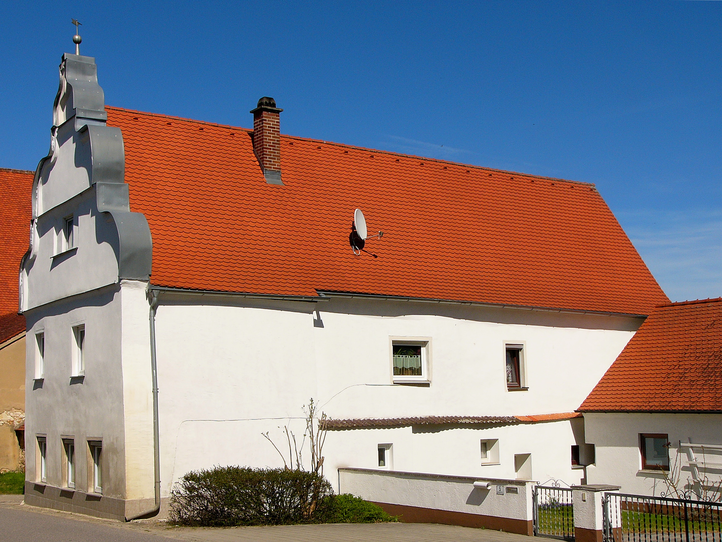 Ehemalige Synagoge. Zweigeschossig mit geschwungenem Giebel, 17./18. Jahrhundert. This is a photograph of an architectural monument.